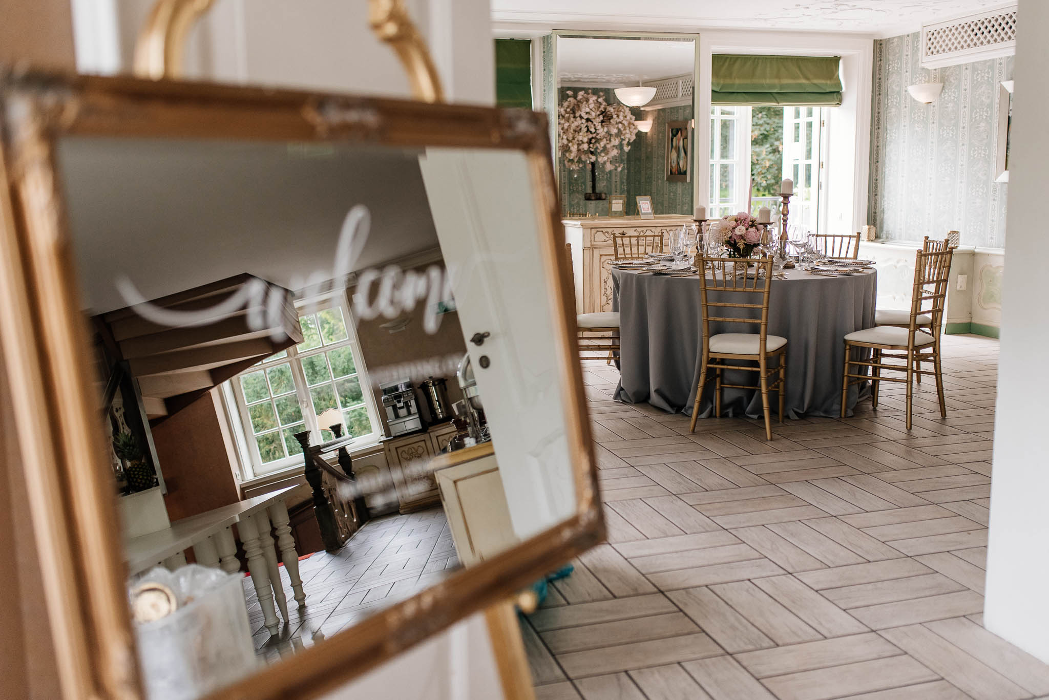 Zala w Dworze Oliwskim udekorowana na przyjęcie weselne.